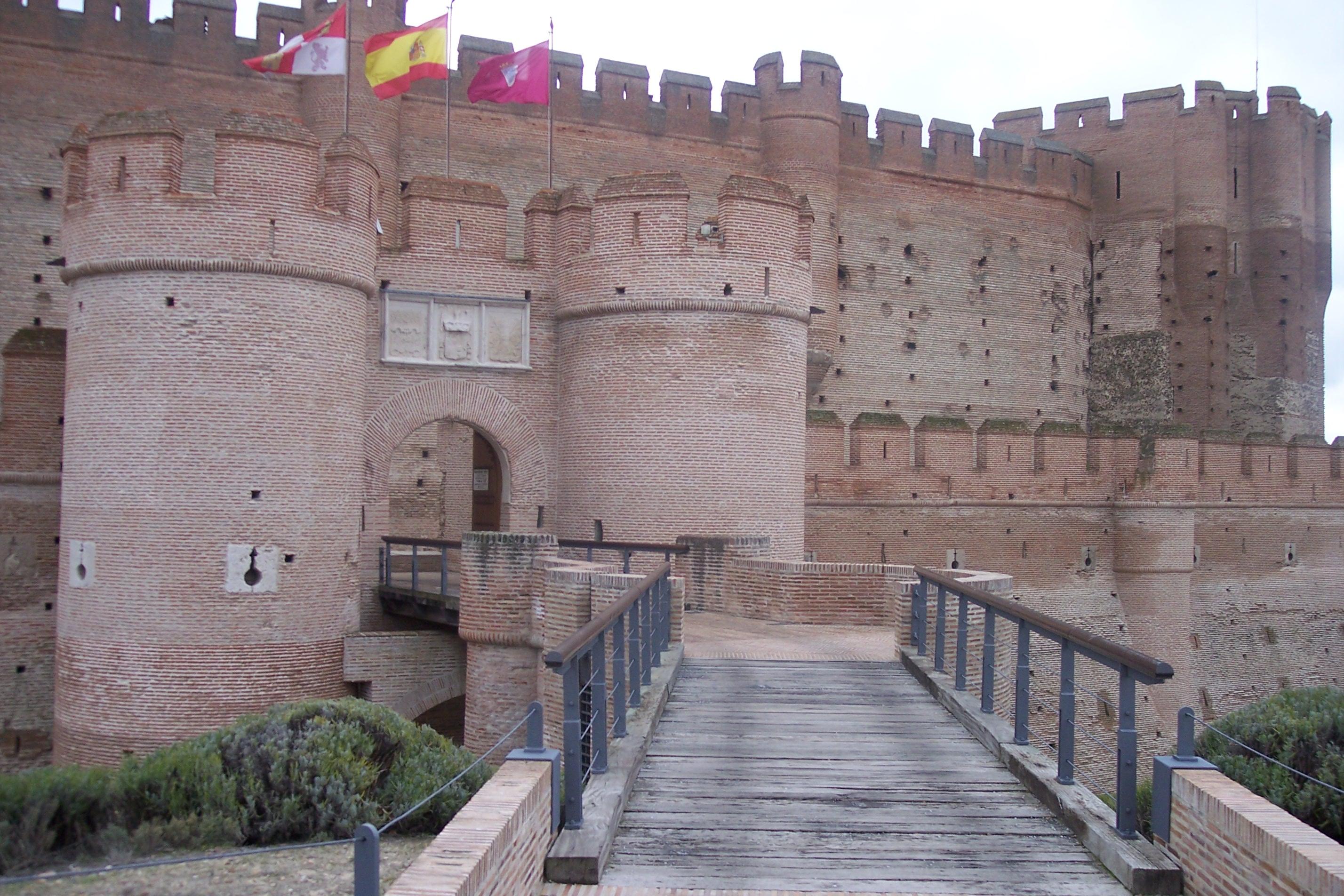 Entrada del Castillo de La Mota en Medina del Campo, Valladolid (España).